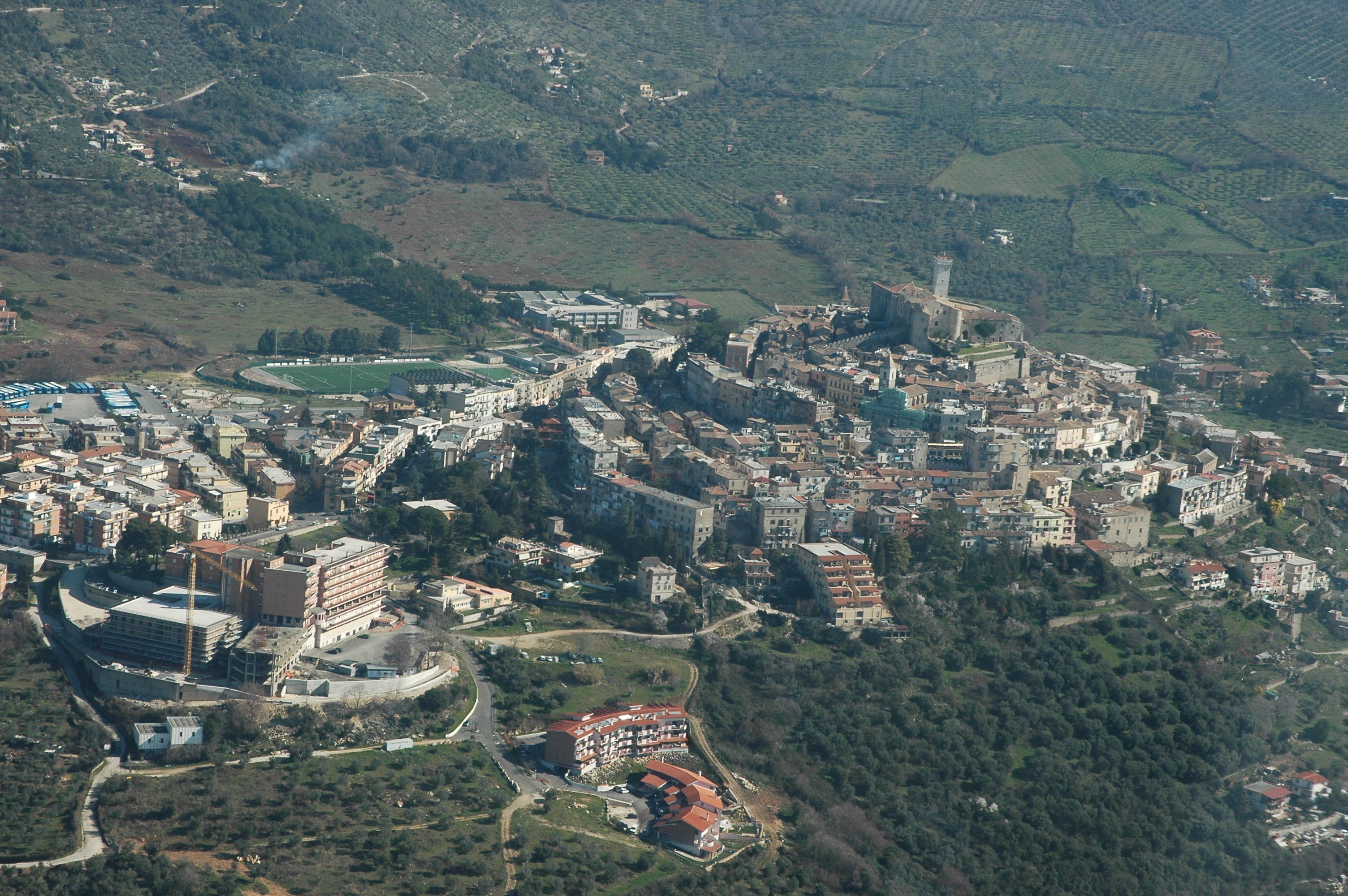 Volo di ritorno da Foligno a Sabaudia con Stefano, a bordo del Tecnam P2002JF marche I-FADA. Palombara Sabina